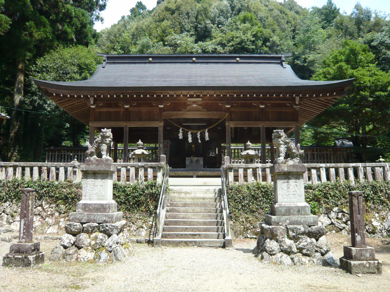 岐阜県山県市大桑、十五社神社本殿。